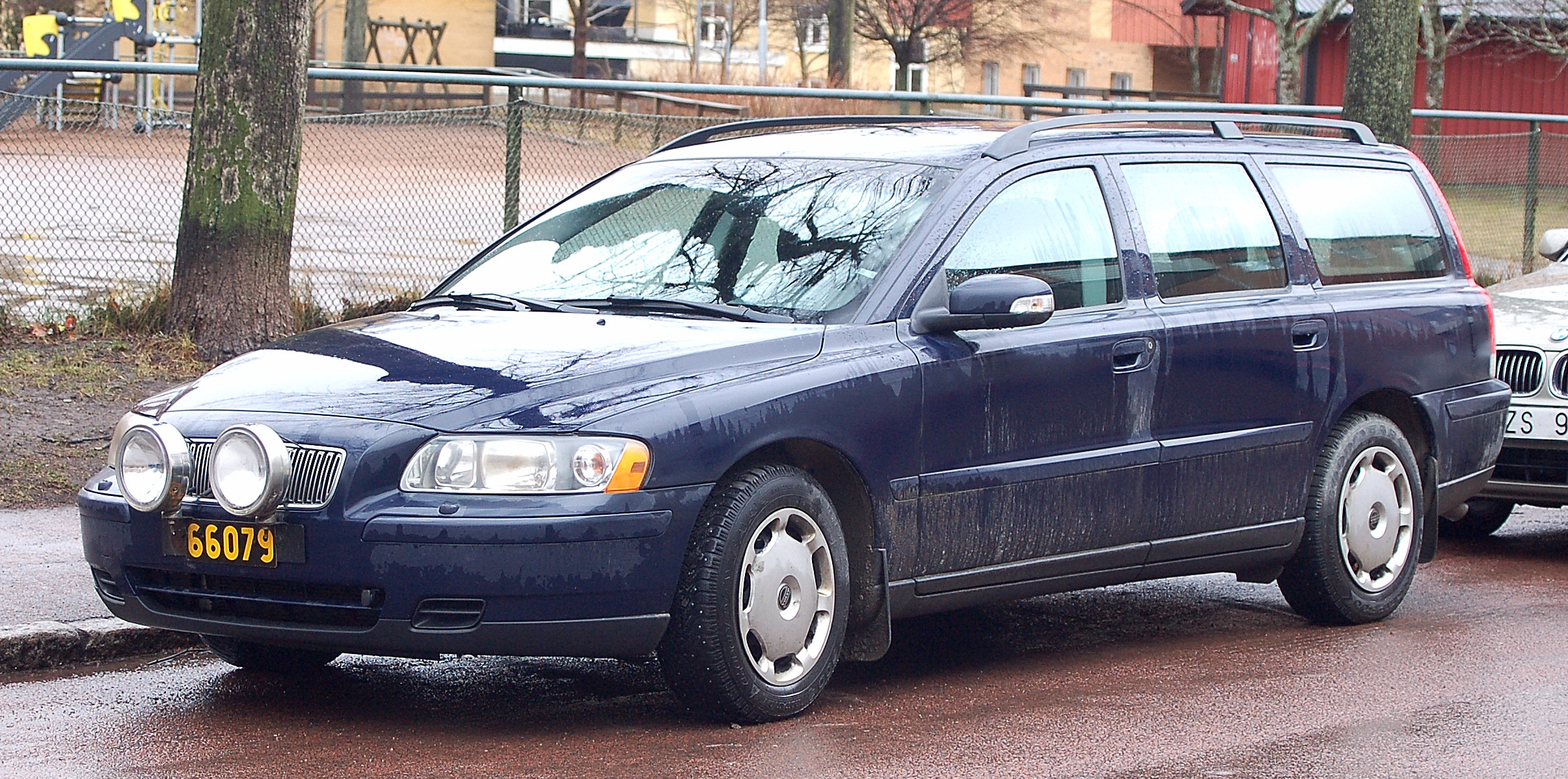 Militär Volvo V70.